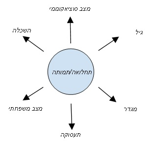 גורמים המהווים ערפלנים נפוצים במחקר